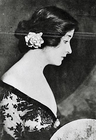 Clara Kimball Young